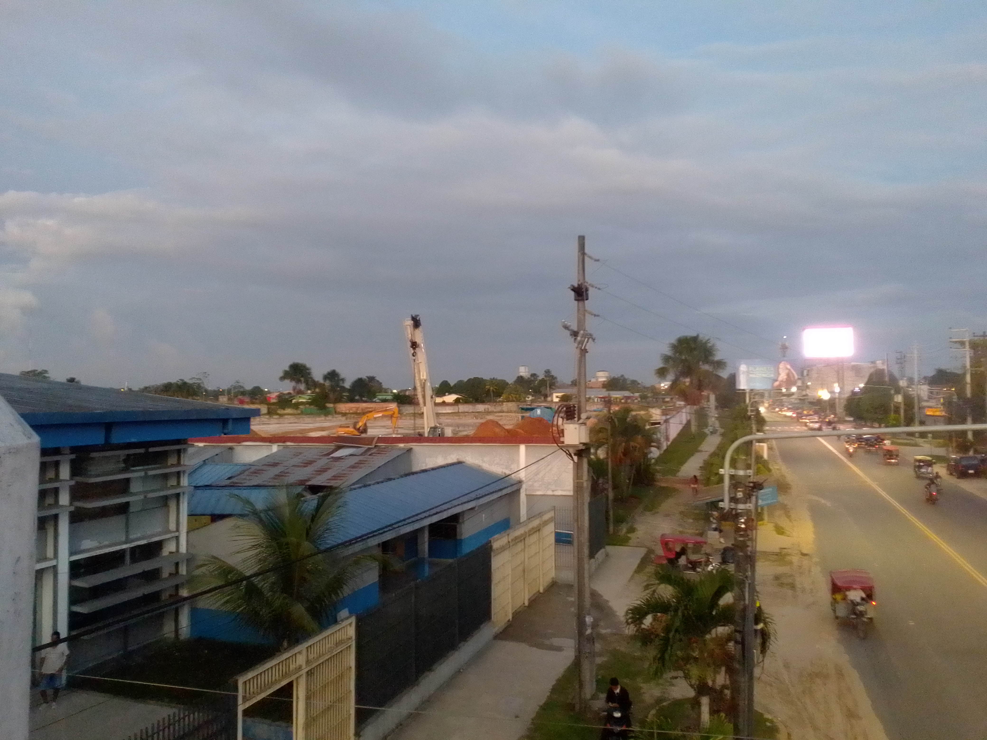 Construcción Mall Plaza Iquitos